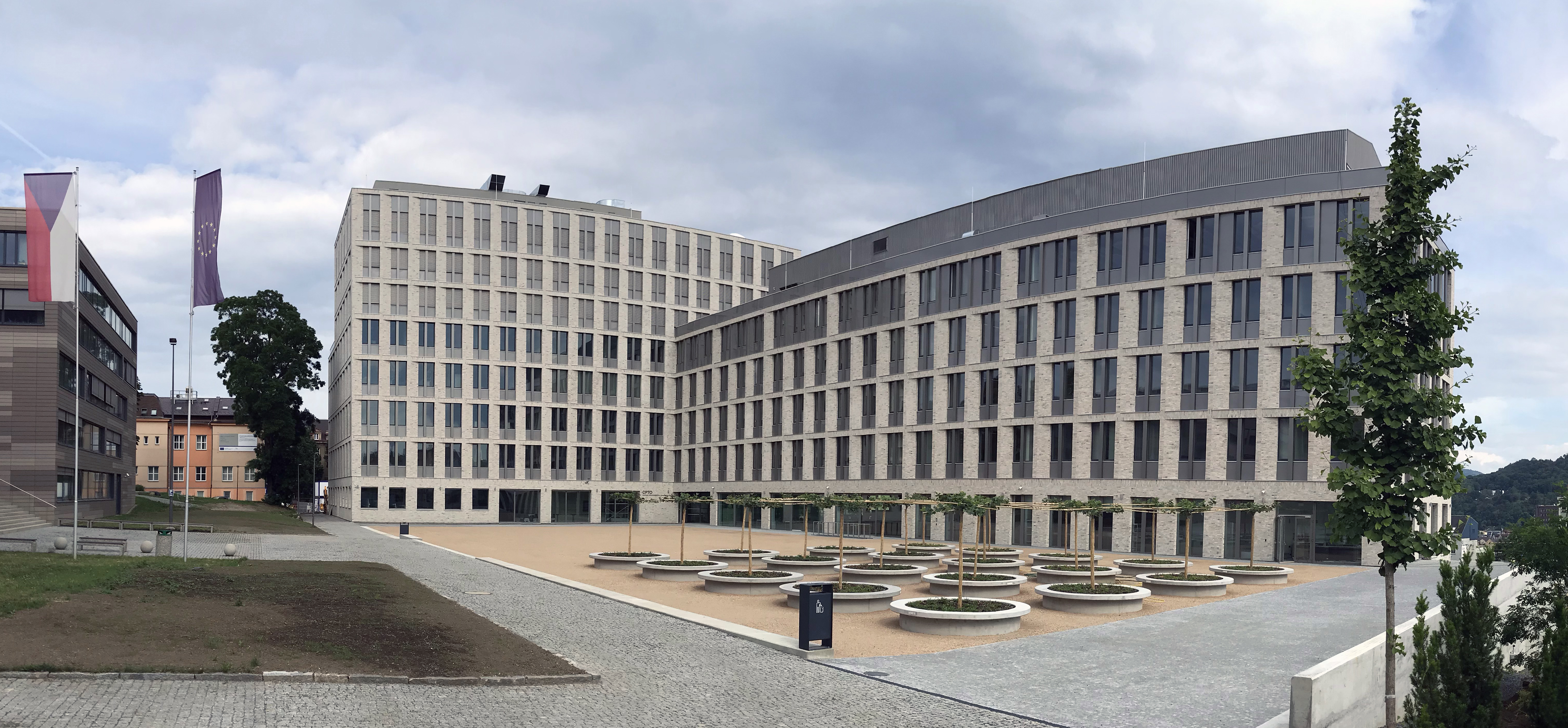 Pohled na novou budovu Centra přírodovědných a technických oborů (červen 2020), v němž má sídlo Přírodovědecká fakulta a Fakulta životního prostředí, a menza UJEP v Ústí nad Labem.